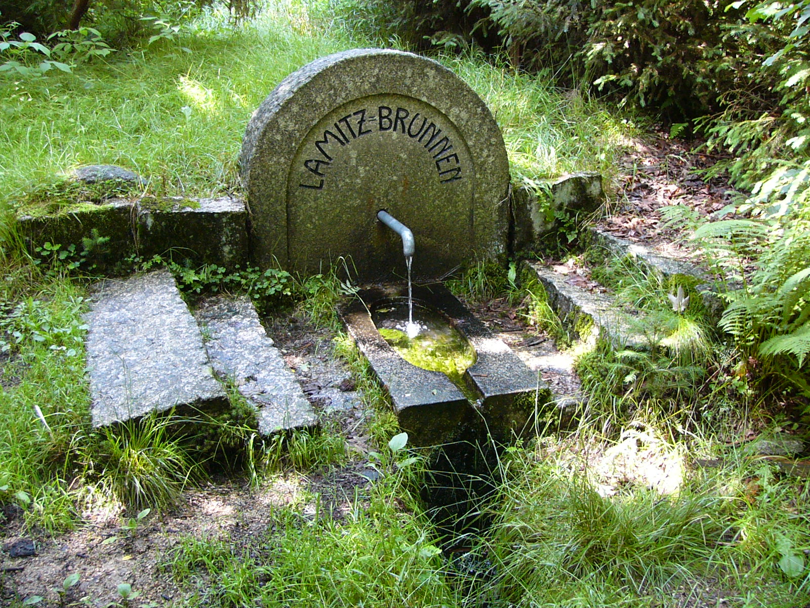 Lamitzquelle am Bergkopf